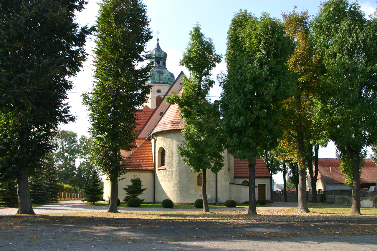 Pokrzywnica - rzymskokatolicki kościół parafialny p.w. św. Sebastiana